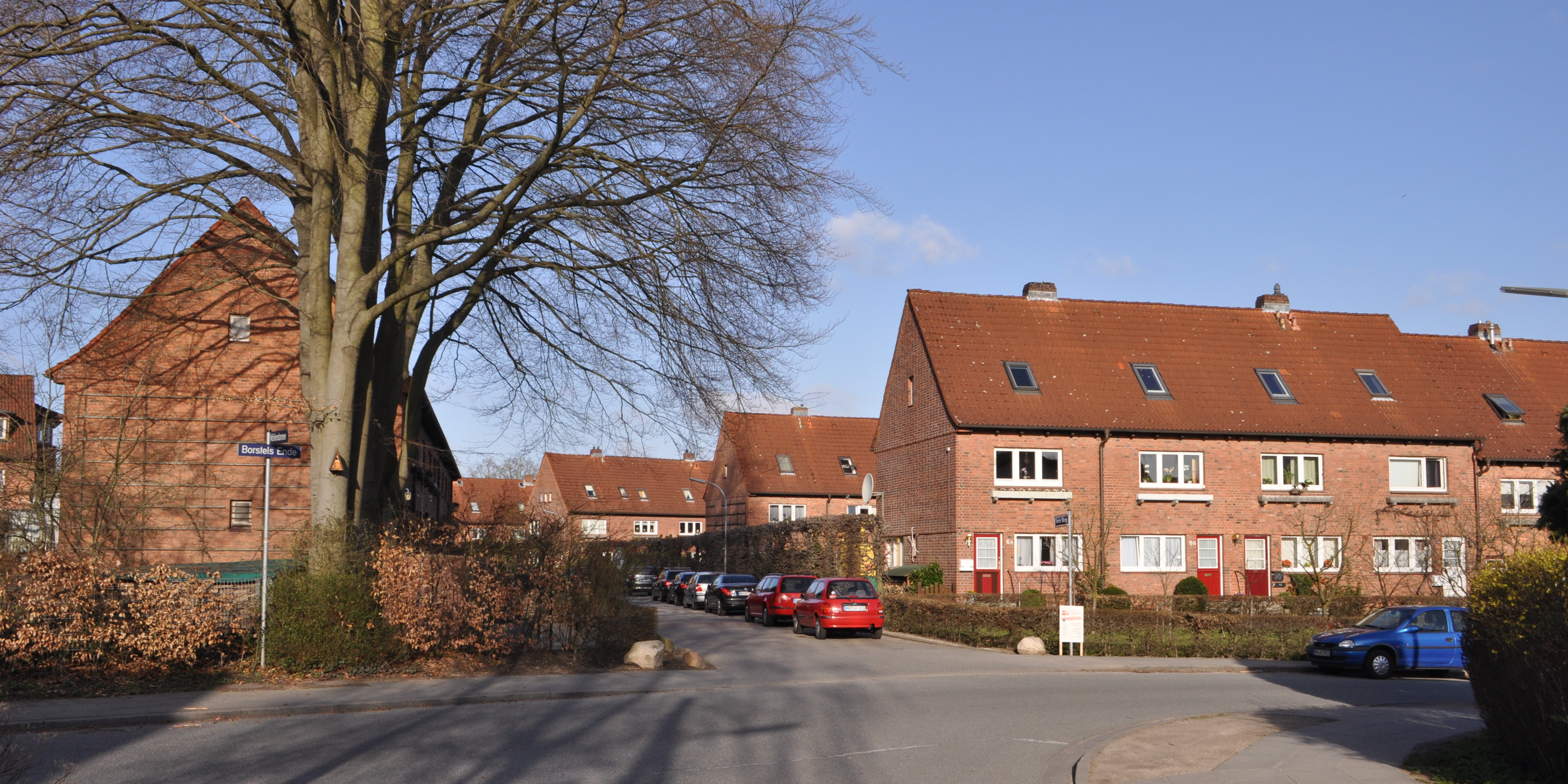 Frank'sche Siedlung an der Straße Borstels Ende in Hamburg-Ohlsdorf. This is a photograph of an architectural monument.